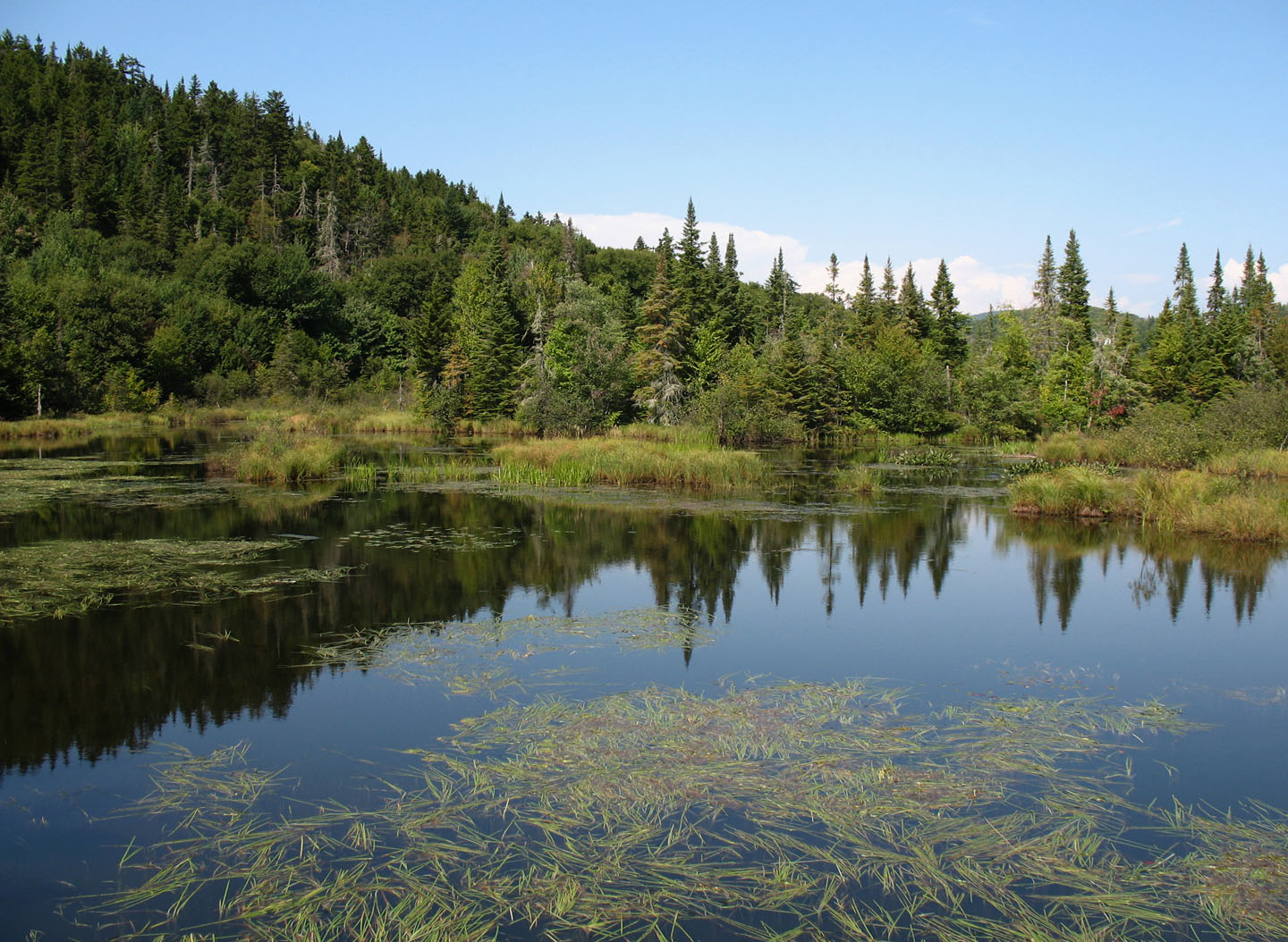 Sentier d'interprétation de la Réserve naturelle des Marais-du-Nord, 1100, chemin de la Grande-Ligne, Stoneham, Province de Québec, Canada)